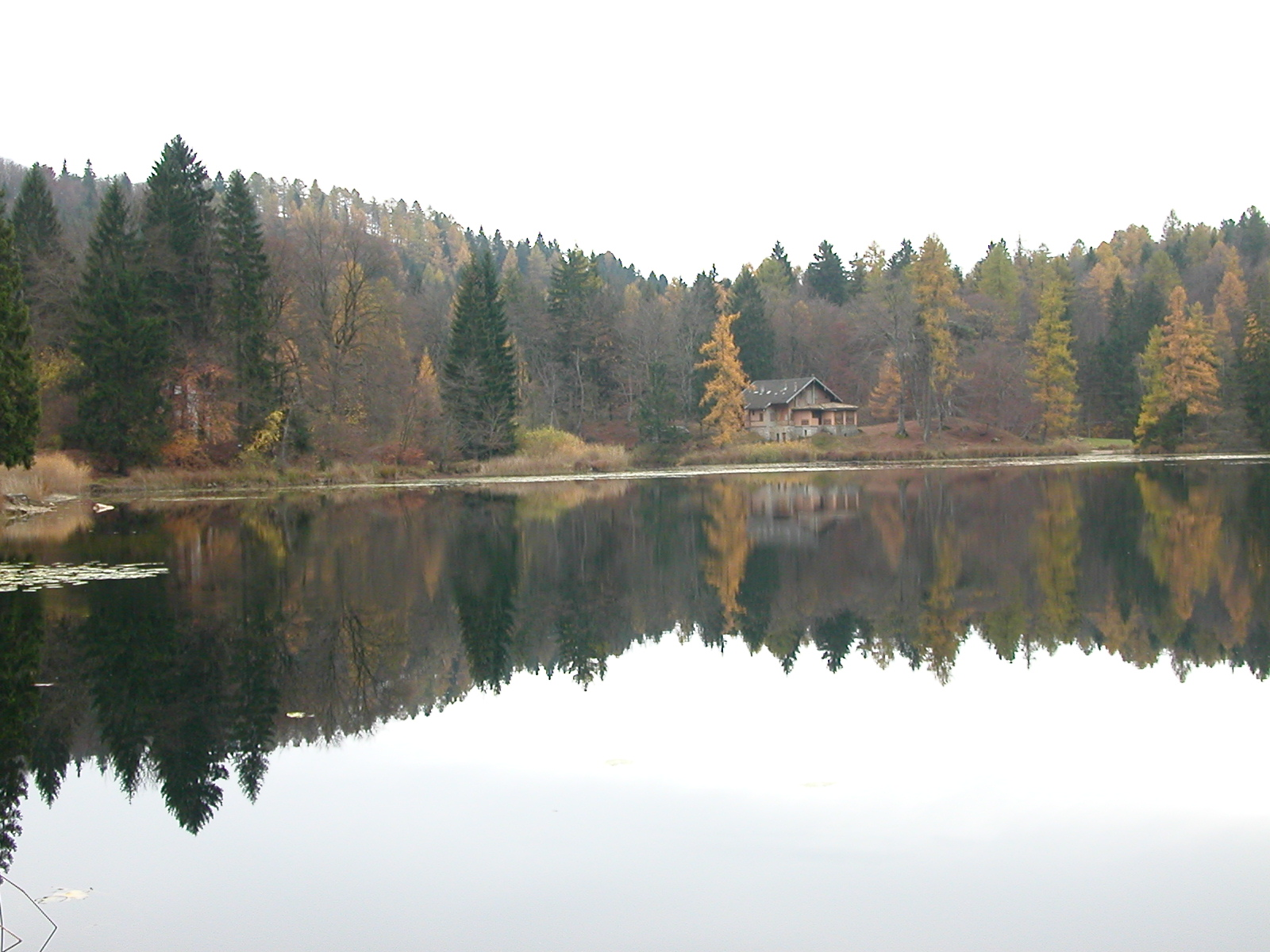 Lago di Cei (autunno)